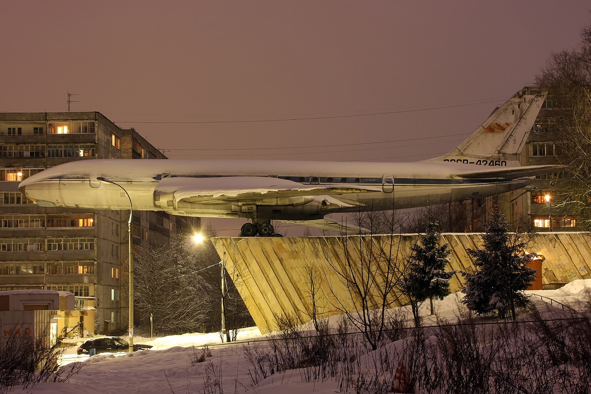 Aeroflot Tupolev Tu-104A